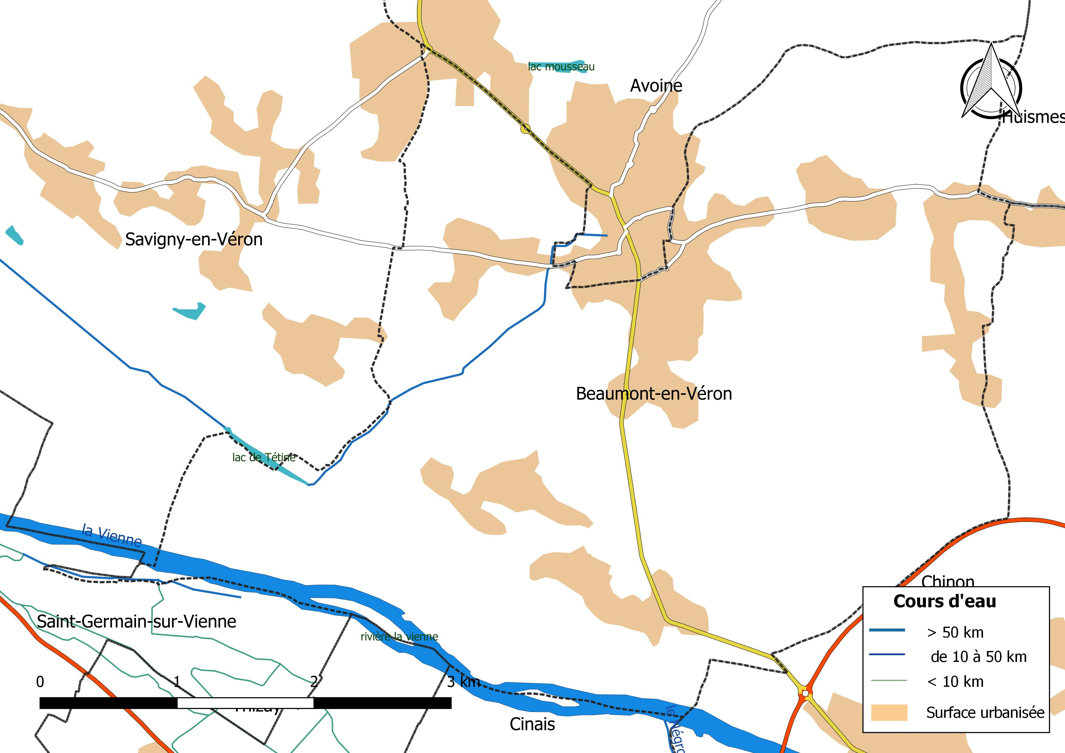 Carte du réseau hydrographique de la commune de Beaumont-en-Véron (France).